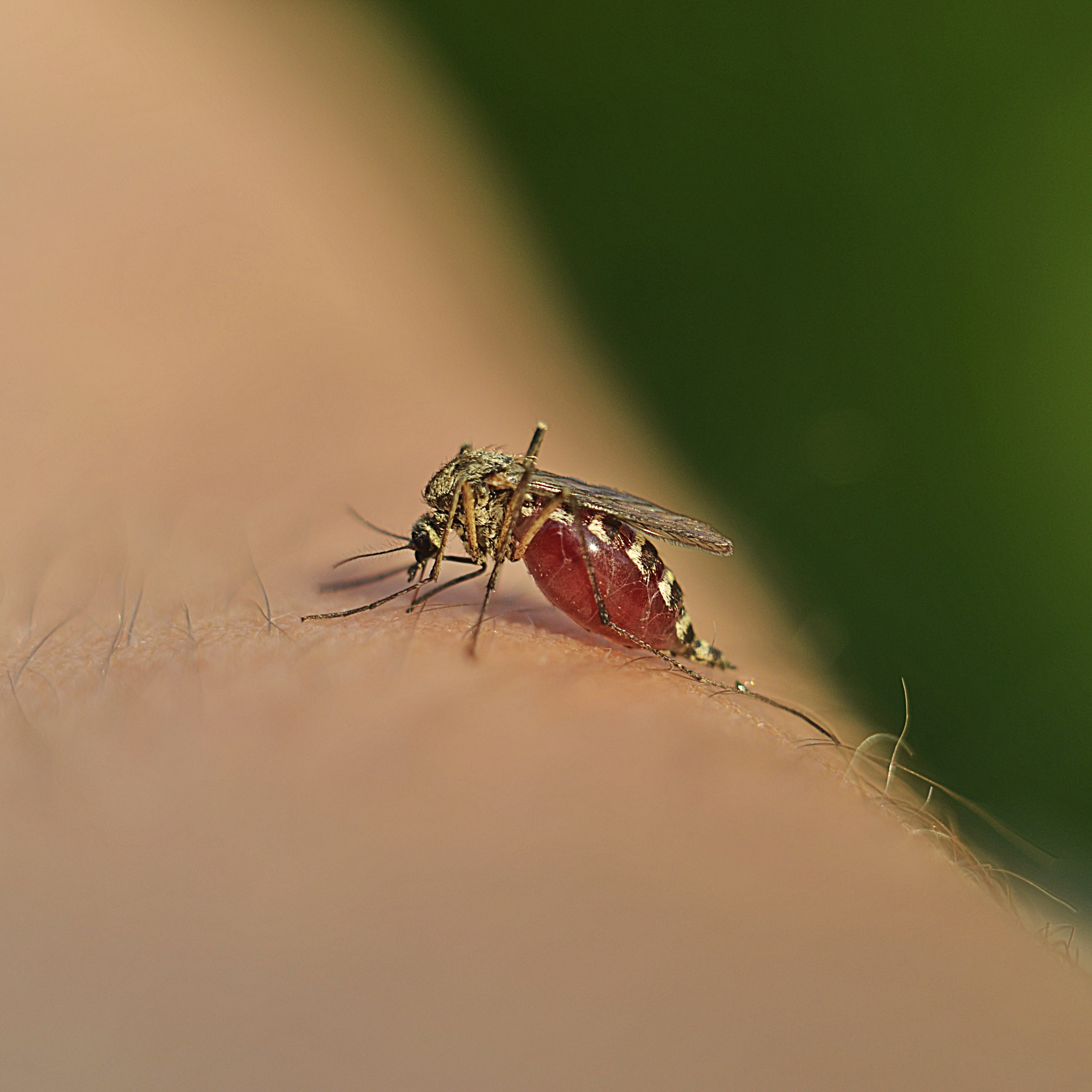 «Тилігульський», Березівський та Лиманський р-ни